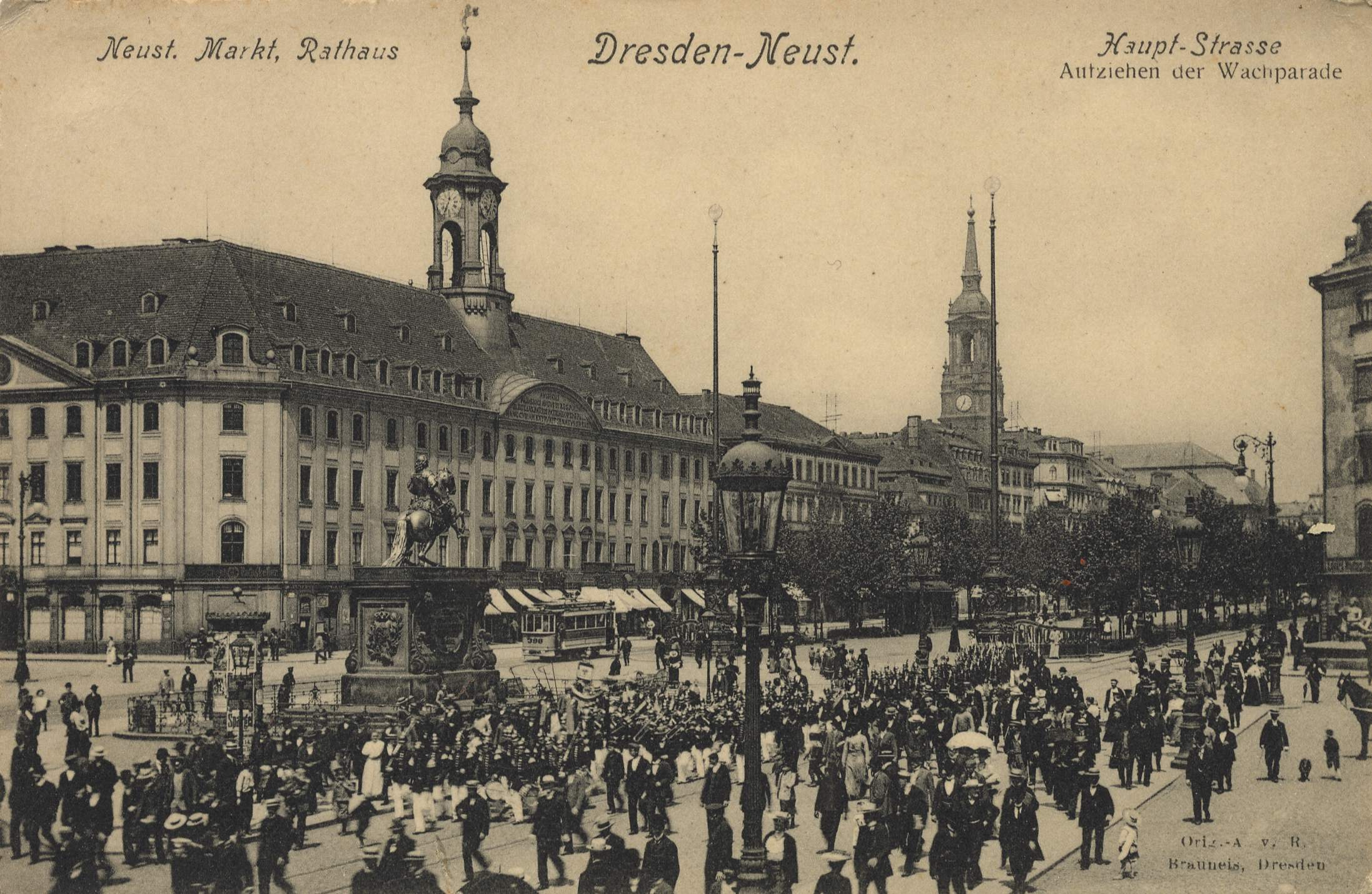 Dresden - Neustadt mit dem Neustädter Markt und Neustädter Rathaus an der Hauptstraße. Postkarte um 1900.